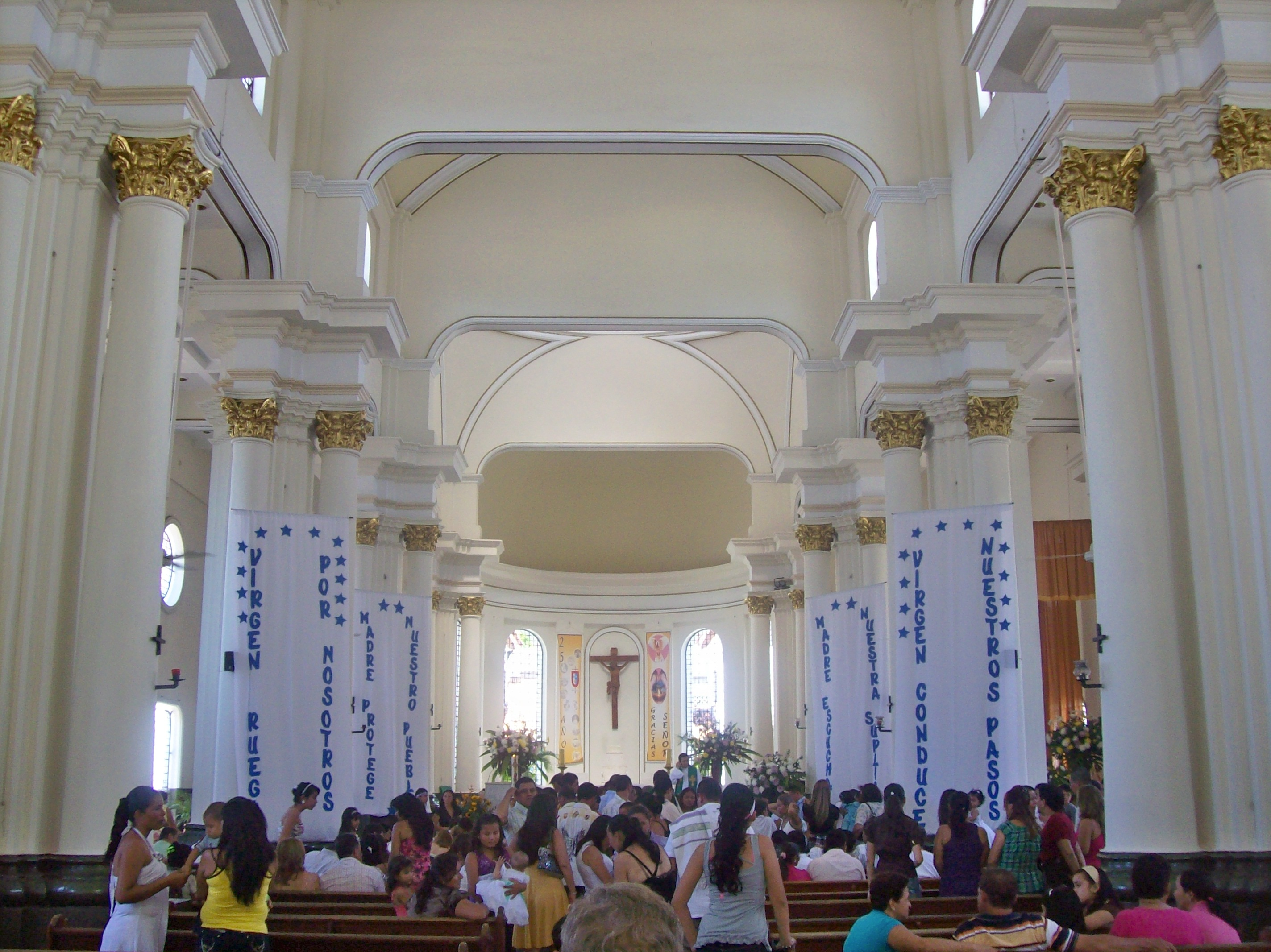 Nave central de la Catedral de Nuestra Señora del Carmen de La Dorada.